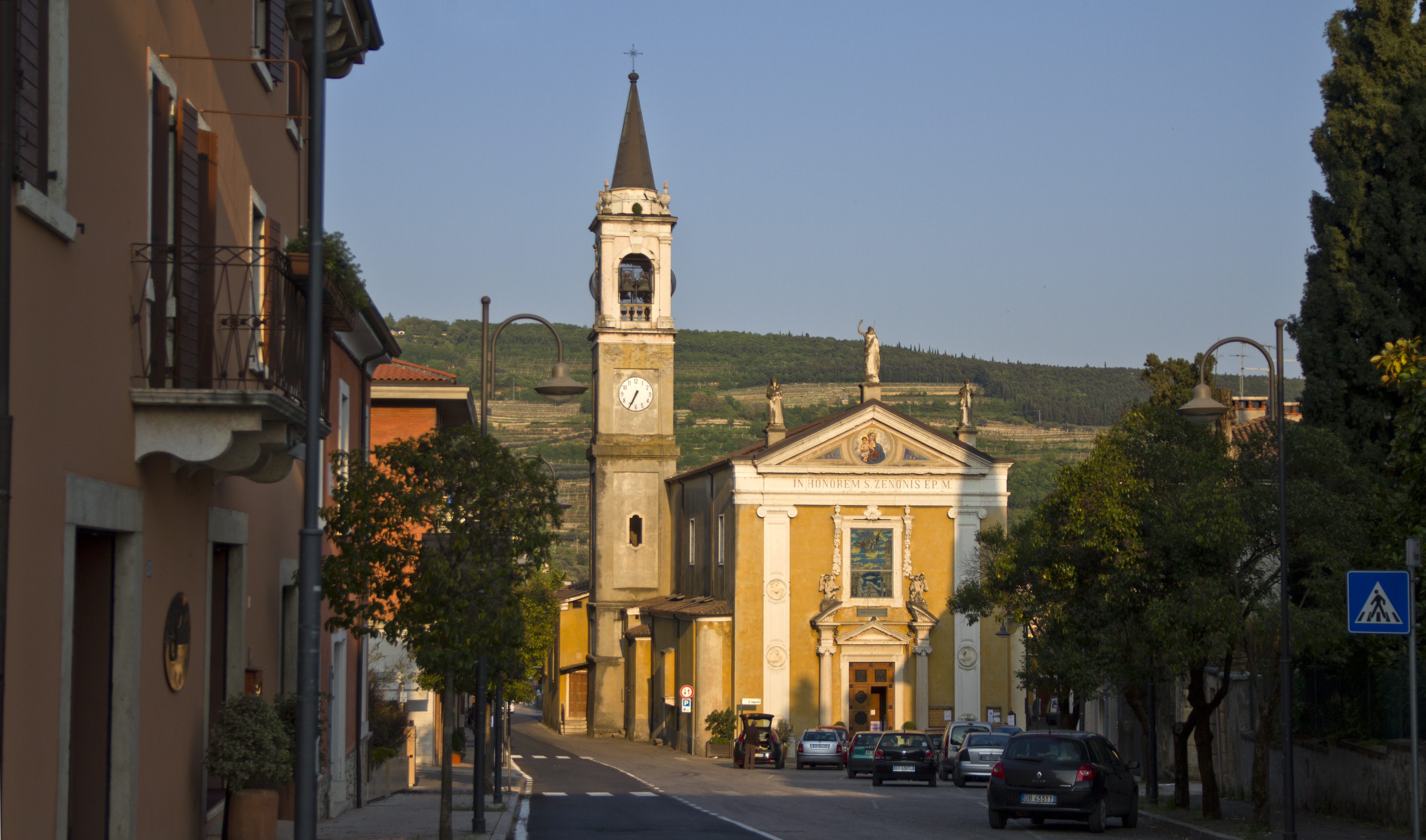 Fumane VR, Veneto, Italy